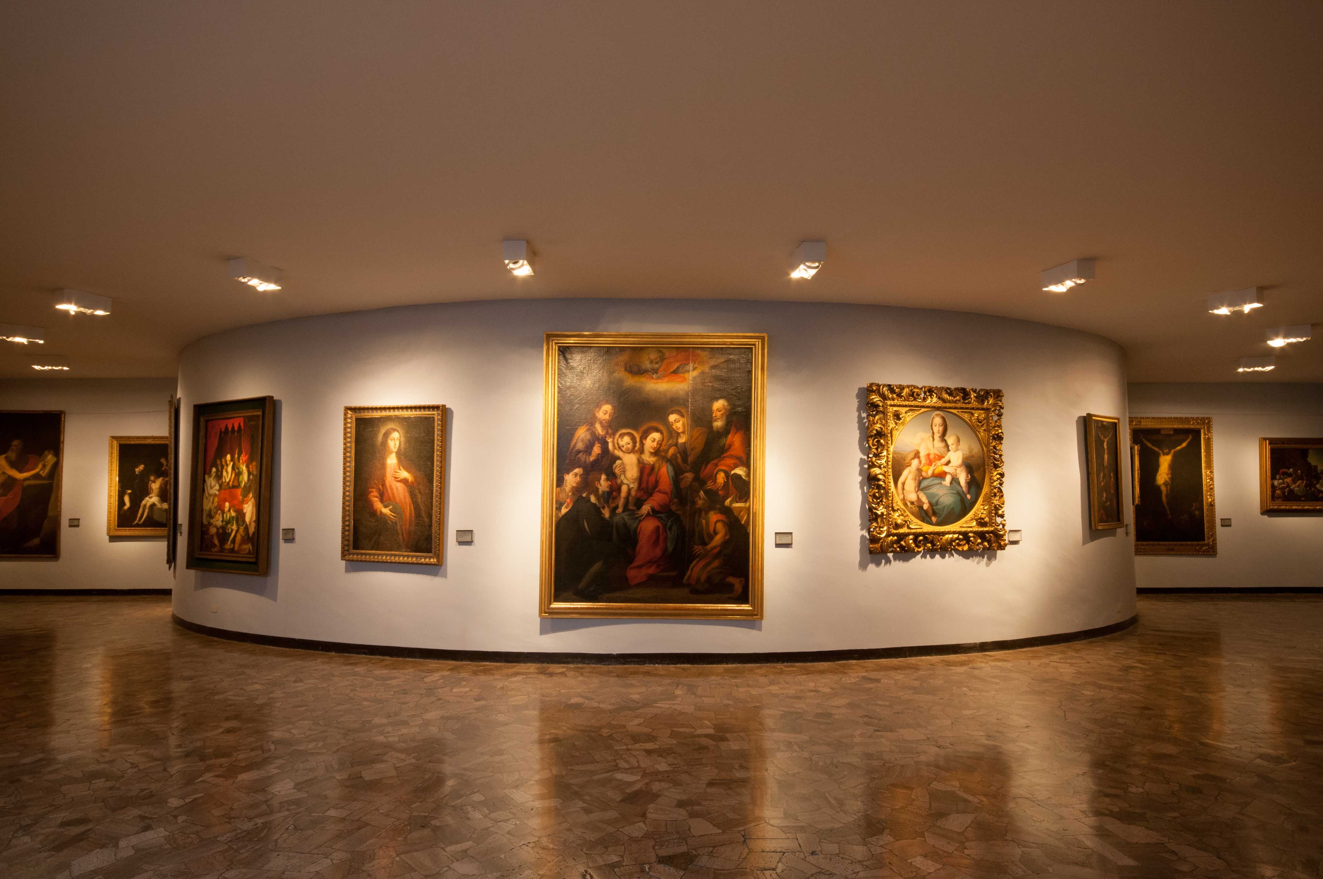 Obras de arte de los siglos XVI hasta XIX. En su mayoría de origen europeo.